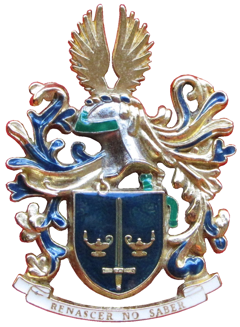 Brasão da Escola da Guarda da Guarda Nacional Republicana, Portugal.